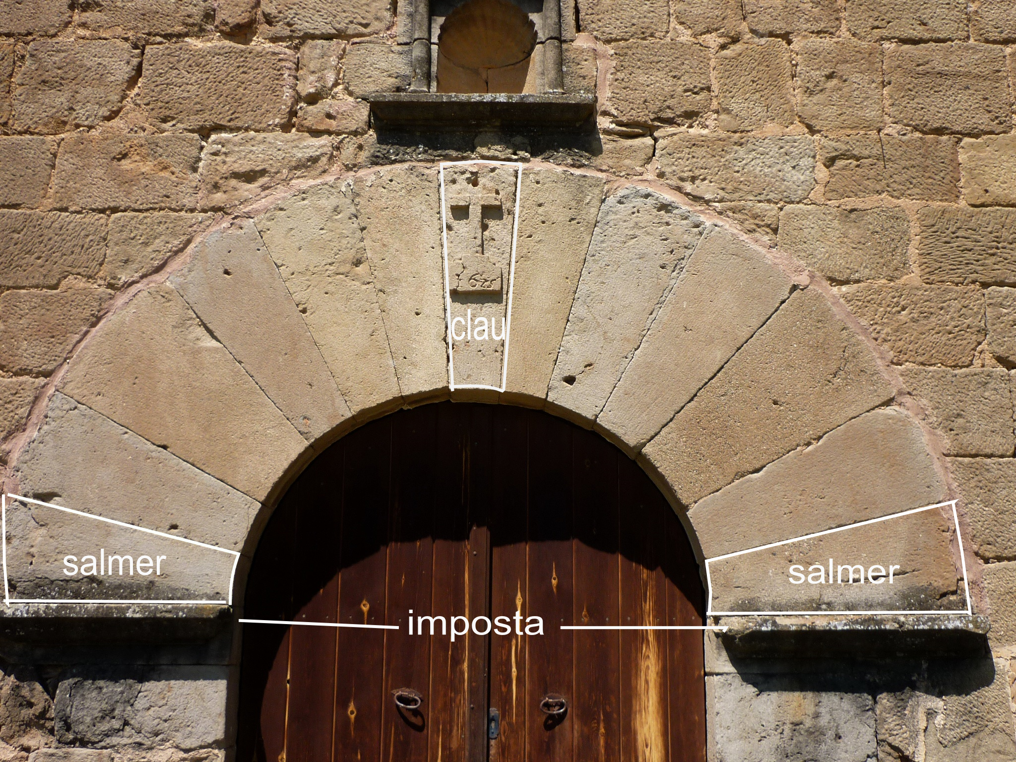 Arc de mig punt amb tretze dovelles a l'església de Sant Gil de Folquer (Artesa de Segre - Noguera)